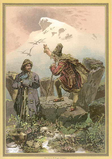 Illustration von Hermann Vogel in Afraja. Romantische Erzählung aus dem hohen Norden. Nach Theodor Mügge für die Jugend bearbeitet von Otto Hoffmann. Mit sechs Farbendruckbildern nach Aquarellen von Hermann Vogel. Stuttgart, Verlag von Julius Hoffmann. (K. Thiemanns Verlag). (1883). Die erste Auflage ist 1870 erschienen.